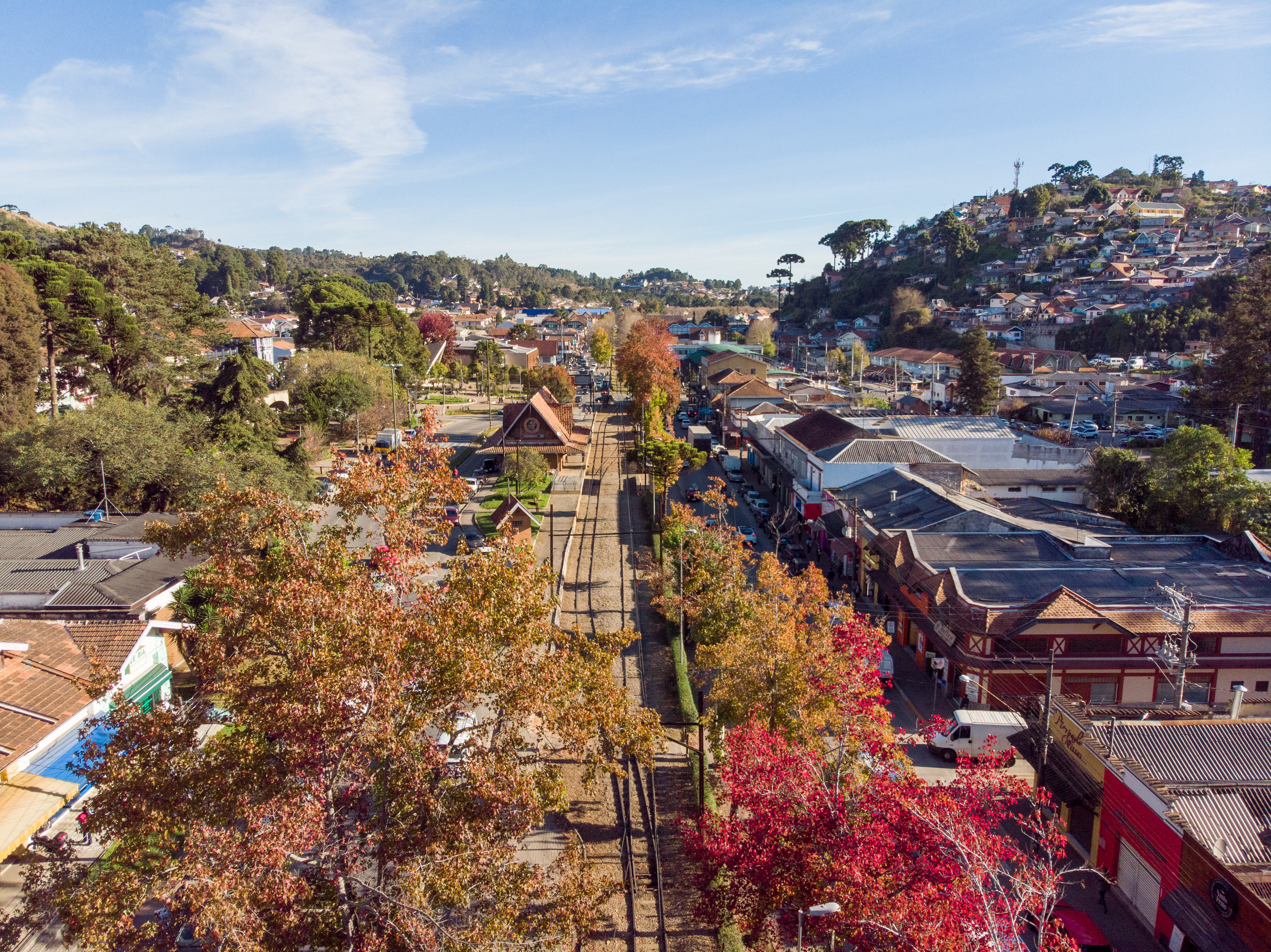 Imagens com drone para o vídeos do festival. Data:11/06/2019. Local: São Paulo Foto: Governo do Estado de São Paulo